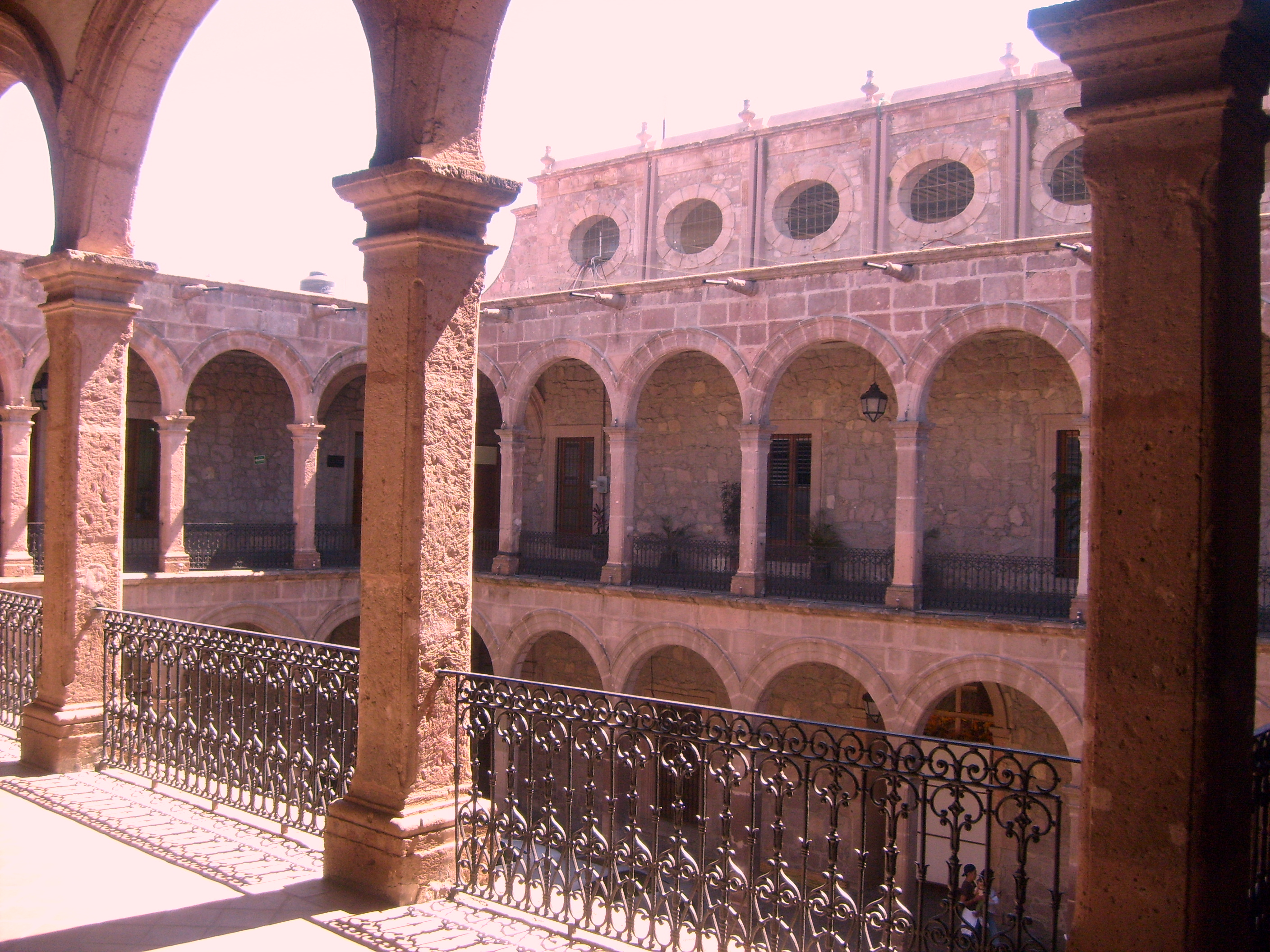 este es uno de los patios del bello palacio de gobierno de morelia